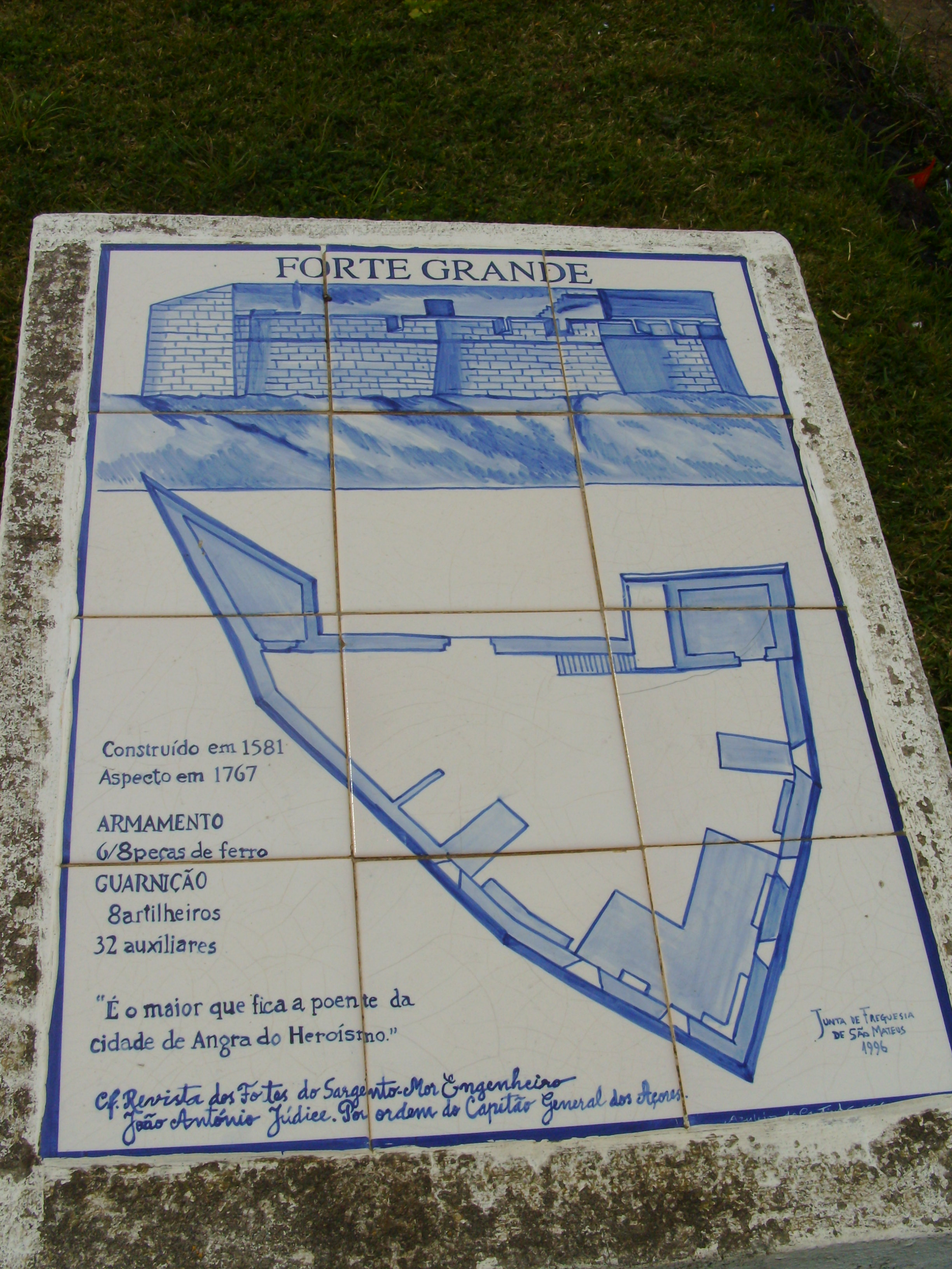 Forte Grande de São Mateus, Ilha Terceira, Açores: painel de azulejos reproduzindo a planta de José Rodrigo de Almeira (1830).